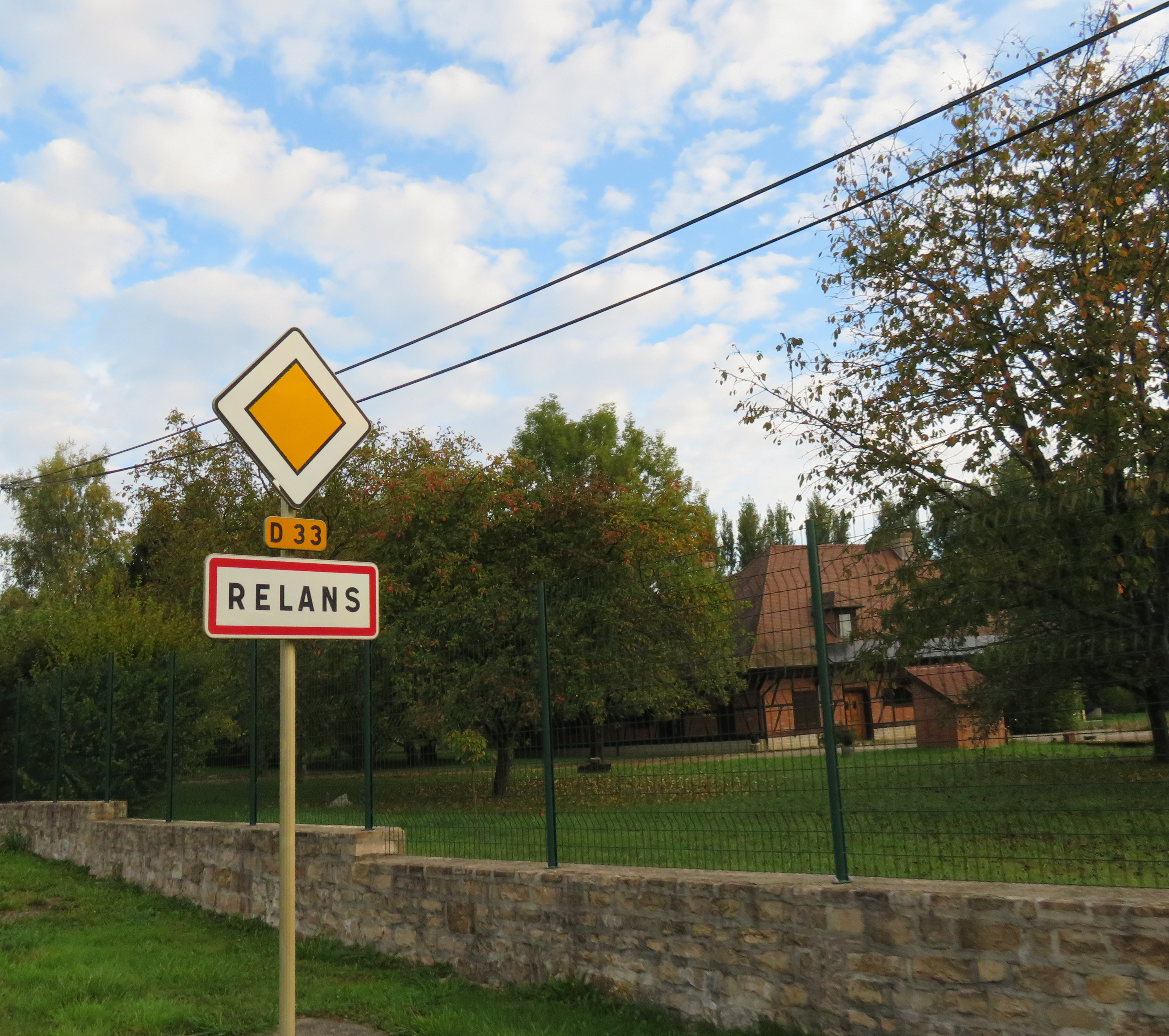 Panneau d’entrée dans la commune de Relans, dans le département du Jura, en venant de Bletterans.